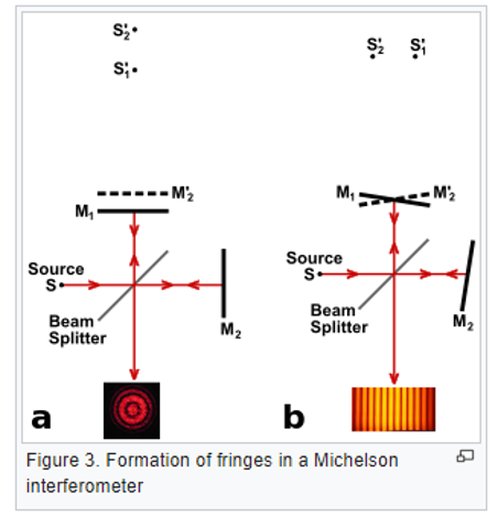 מייקלסון 3